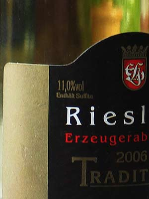 Enthaelt Sulfite